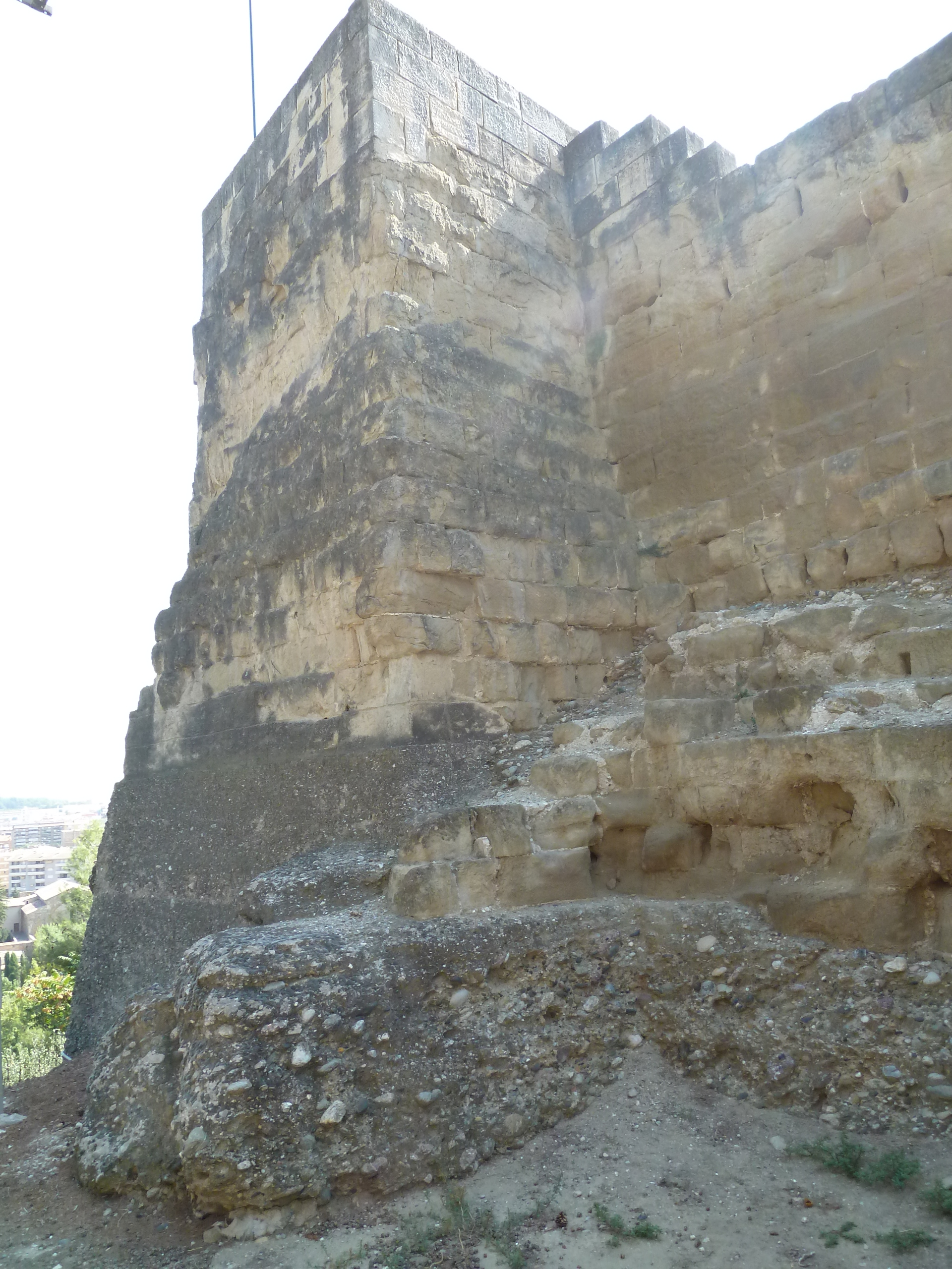 Balaguer